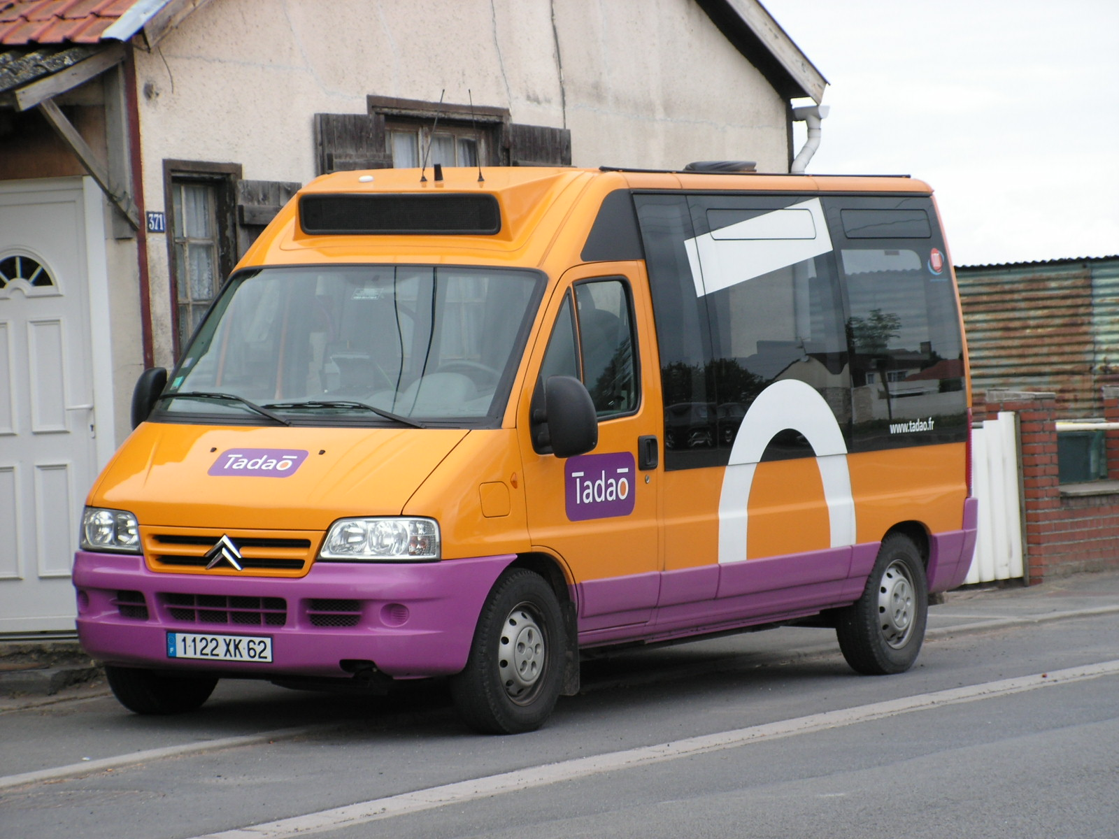 Mini-bus Tadao